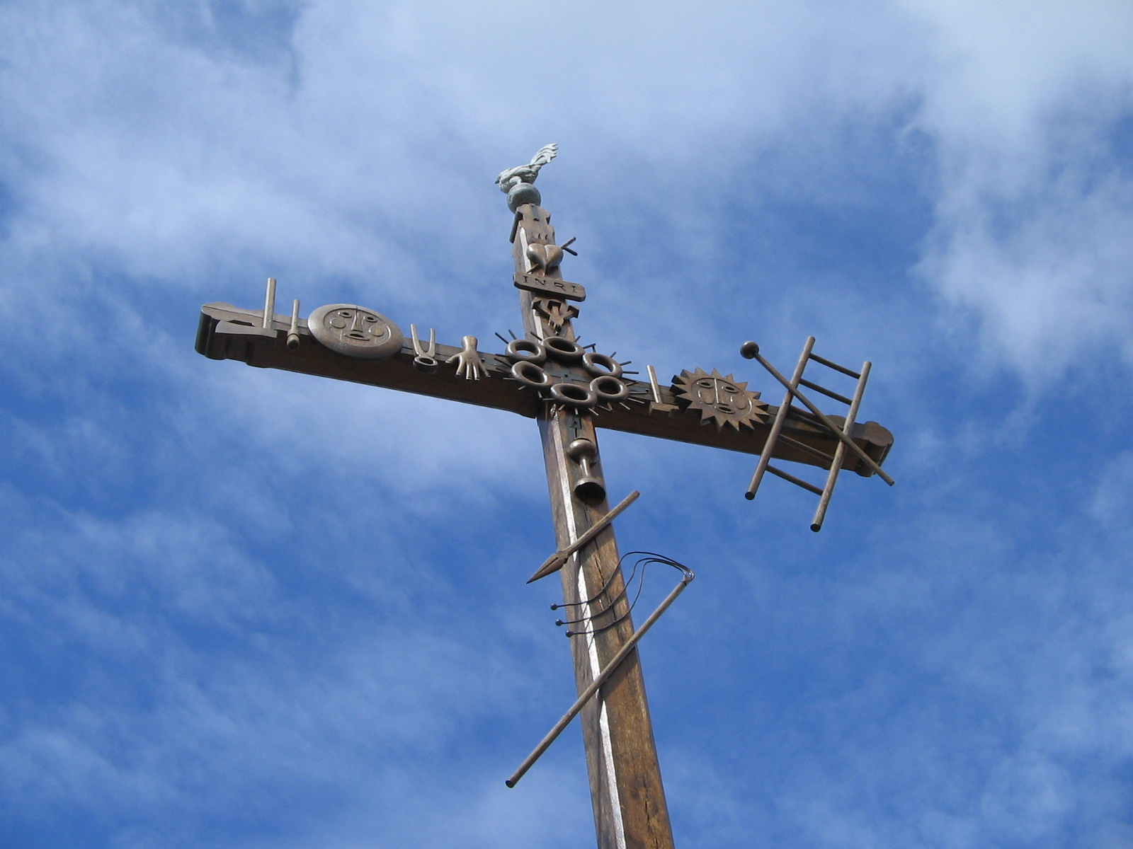 La croix de Béthines (86) en avril 2012